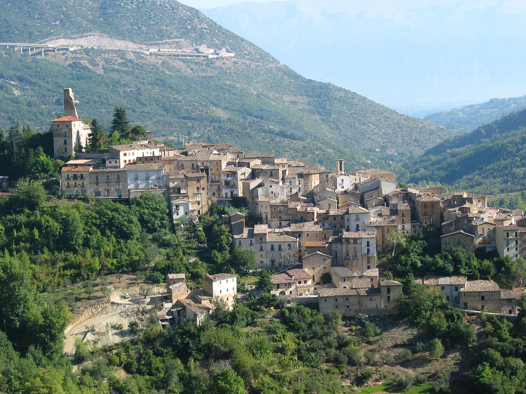 Anversa degli Abruzzi, Abruzzo, ItaliaAnversa degli Abruzzi